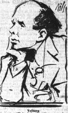 Caricature du financier Aaron Volberg, lors du procès qui l'oppose à Pierre Bonny, parue dans le Petit Parisien du 29 octobre 1935